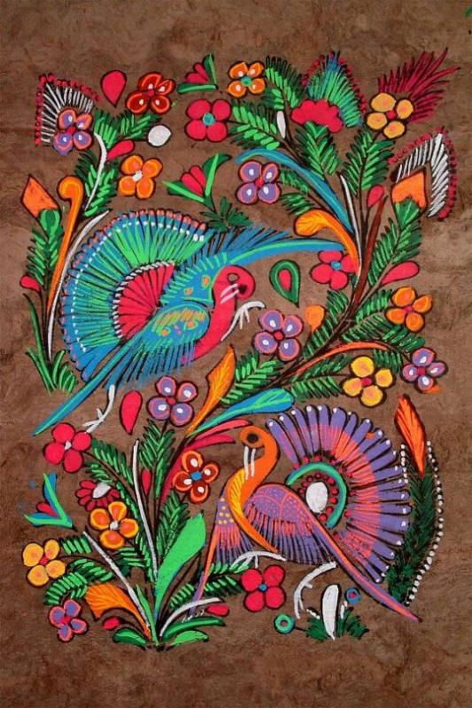 ეს არის ნაჰუას უნიკალური ტექნოლოგიით შესრულებული ნახატი.